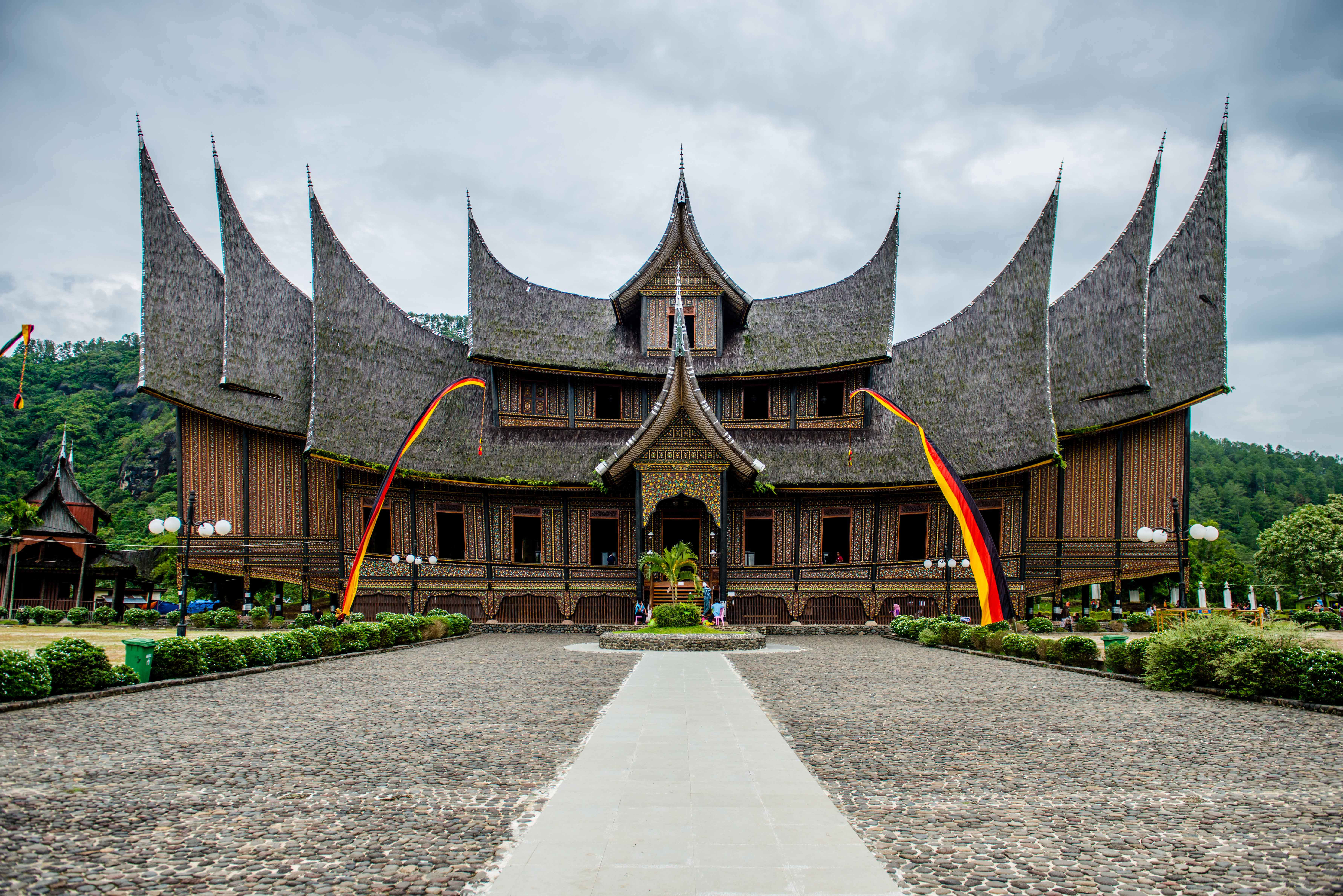 Istano Pagaruyuang